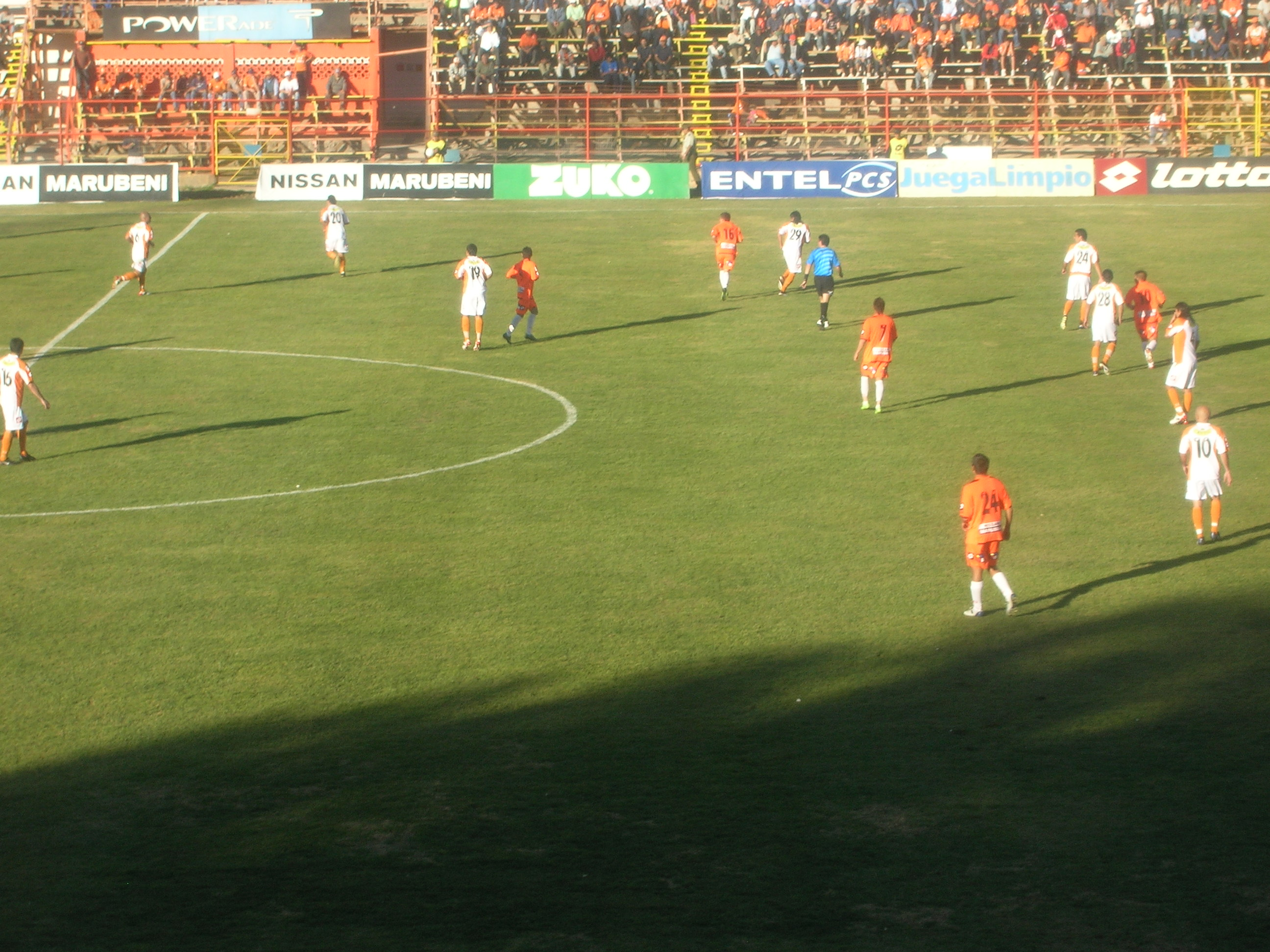 Encuentro disputado entre Club de Deportes Cobreloa y Cobresal.